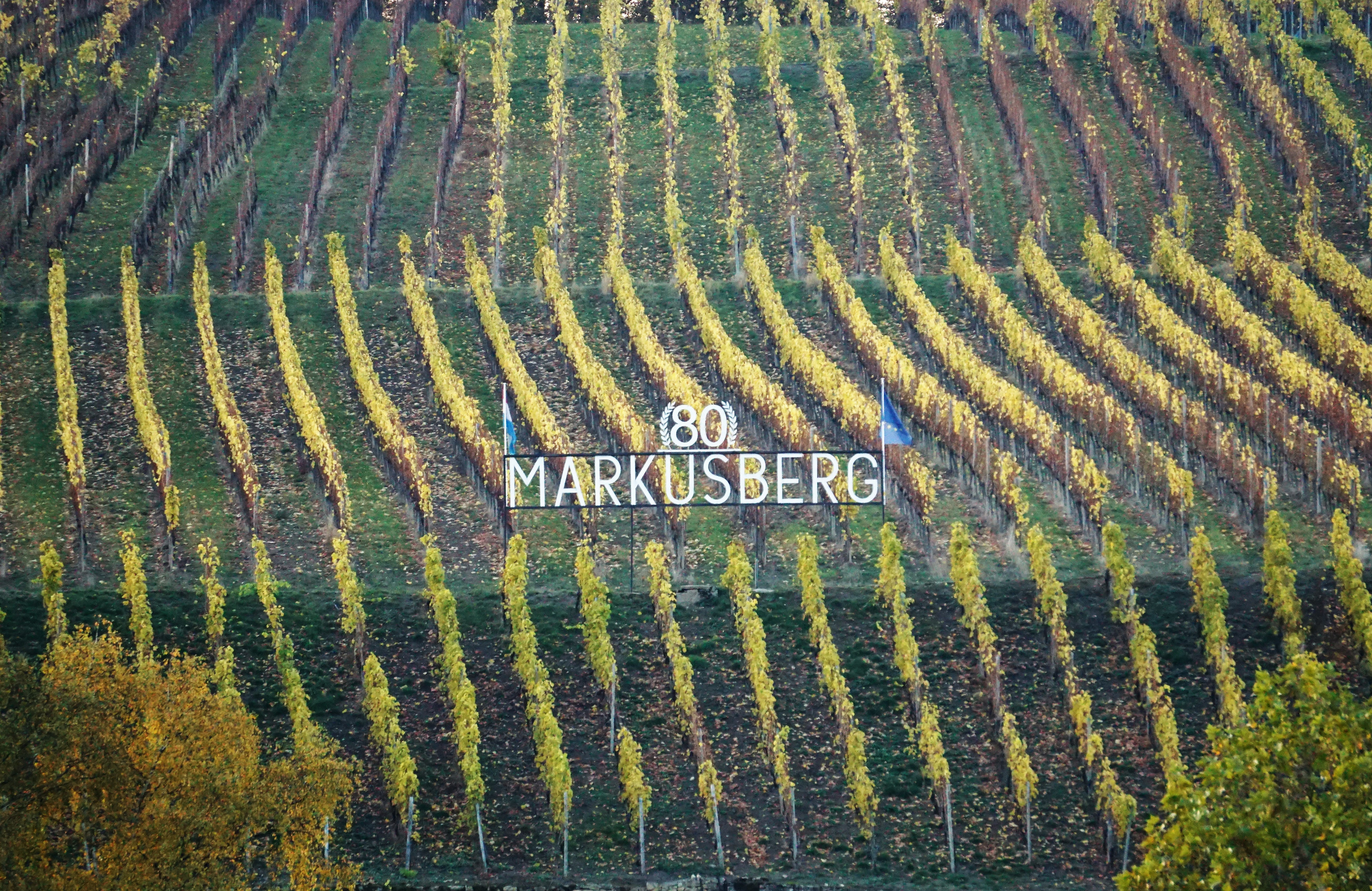 Schengen, Luxembourg. Le vignoble Markusbierg (mont Marc), vu depuis Perl (D).